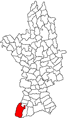 Categorie:Hărţi ale judeţului Olt